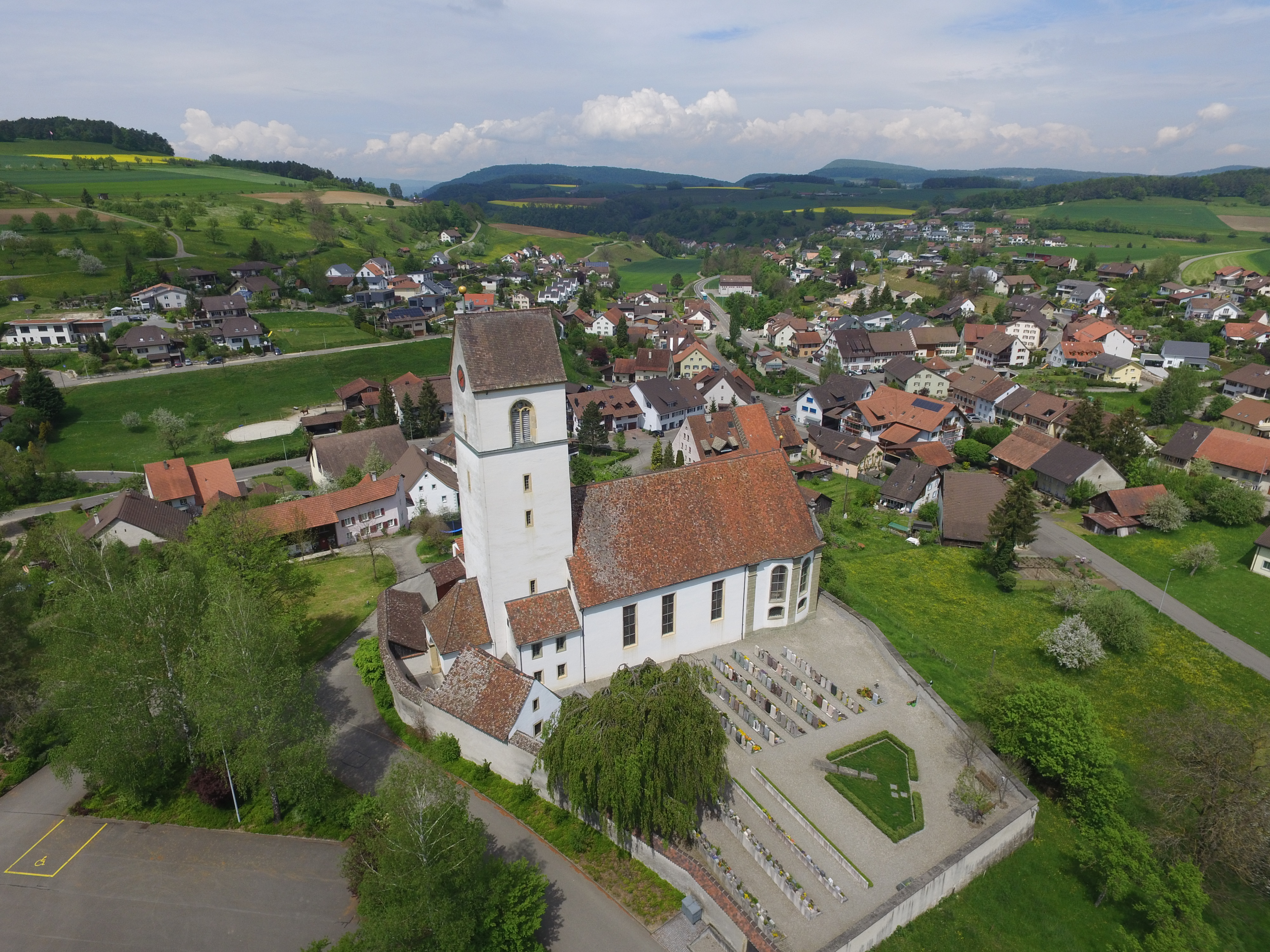 Jurapark , Kirche Herznach